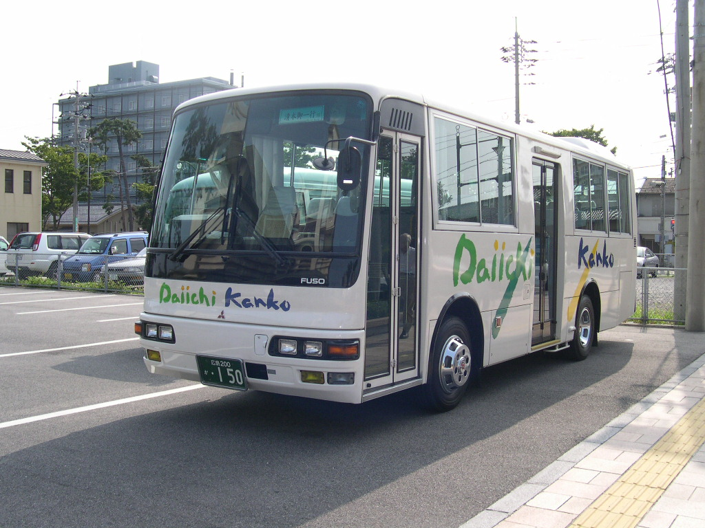 皆生温泉にて ドア配置に注目